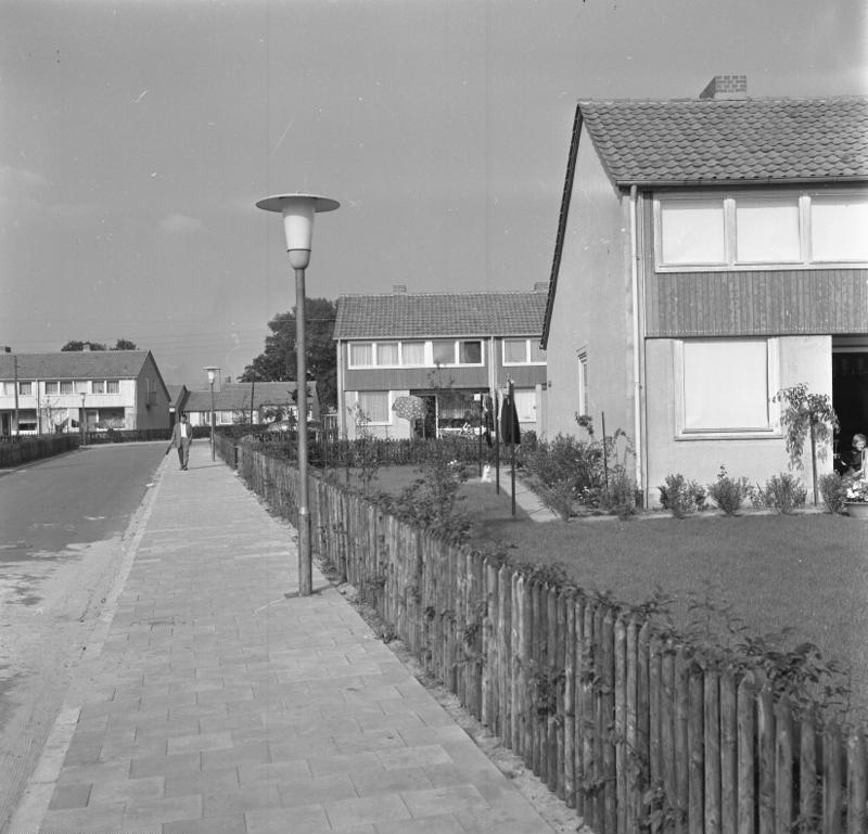 Osnabrück